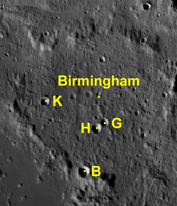 Cráter lunar Birmingham. Cráteres satélite. (Imagen LRO)